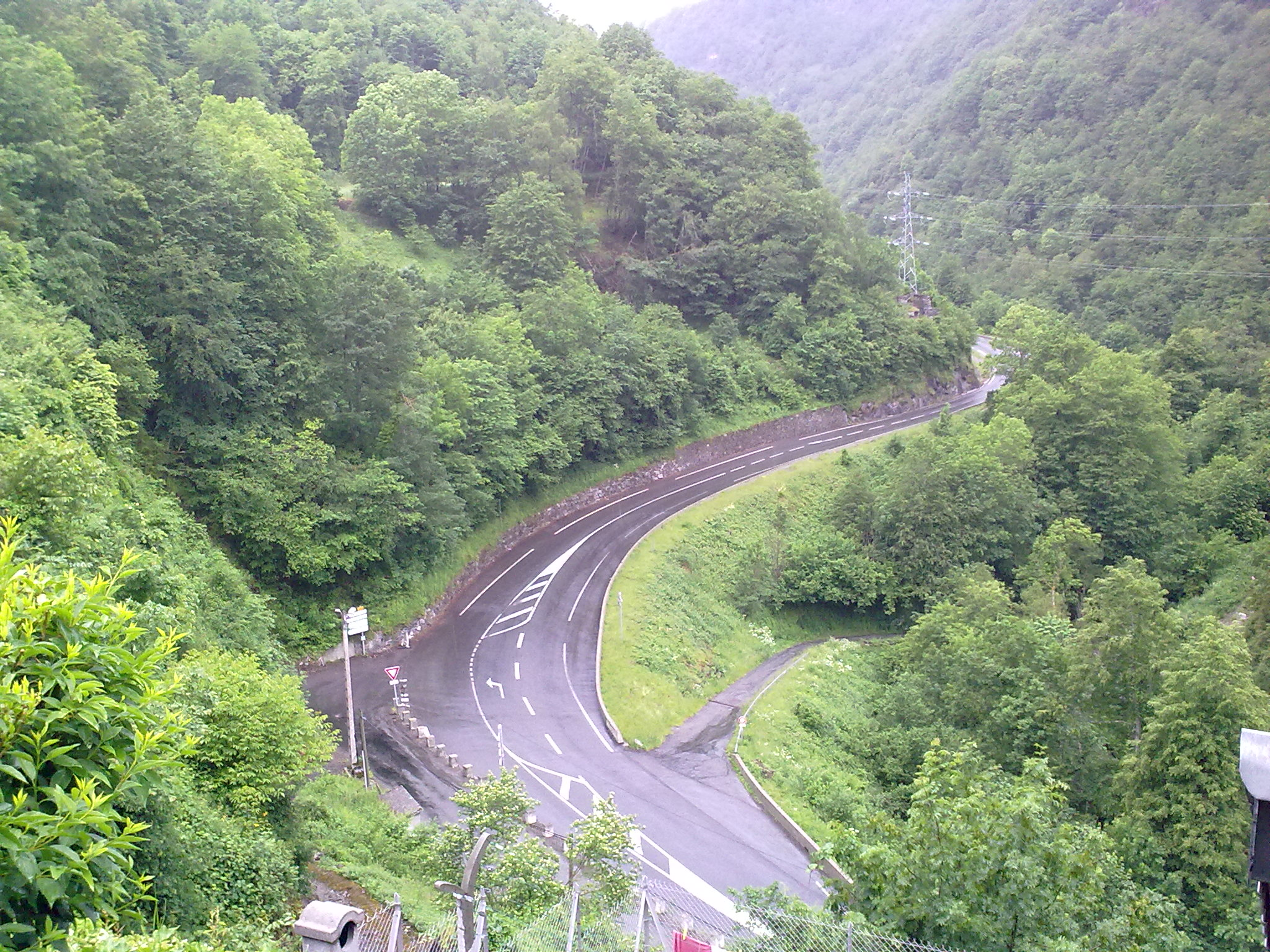 Tramezaïgues